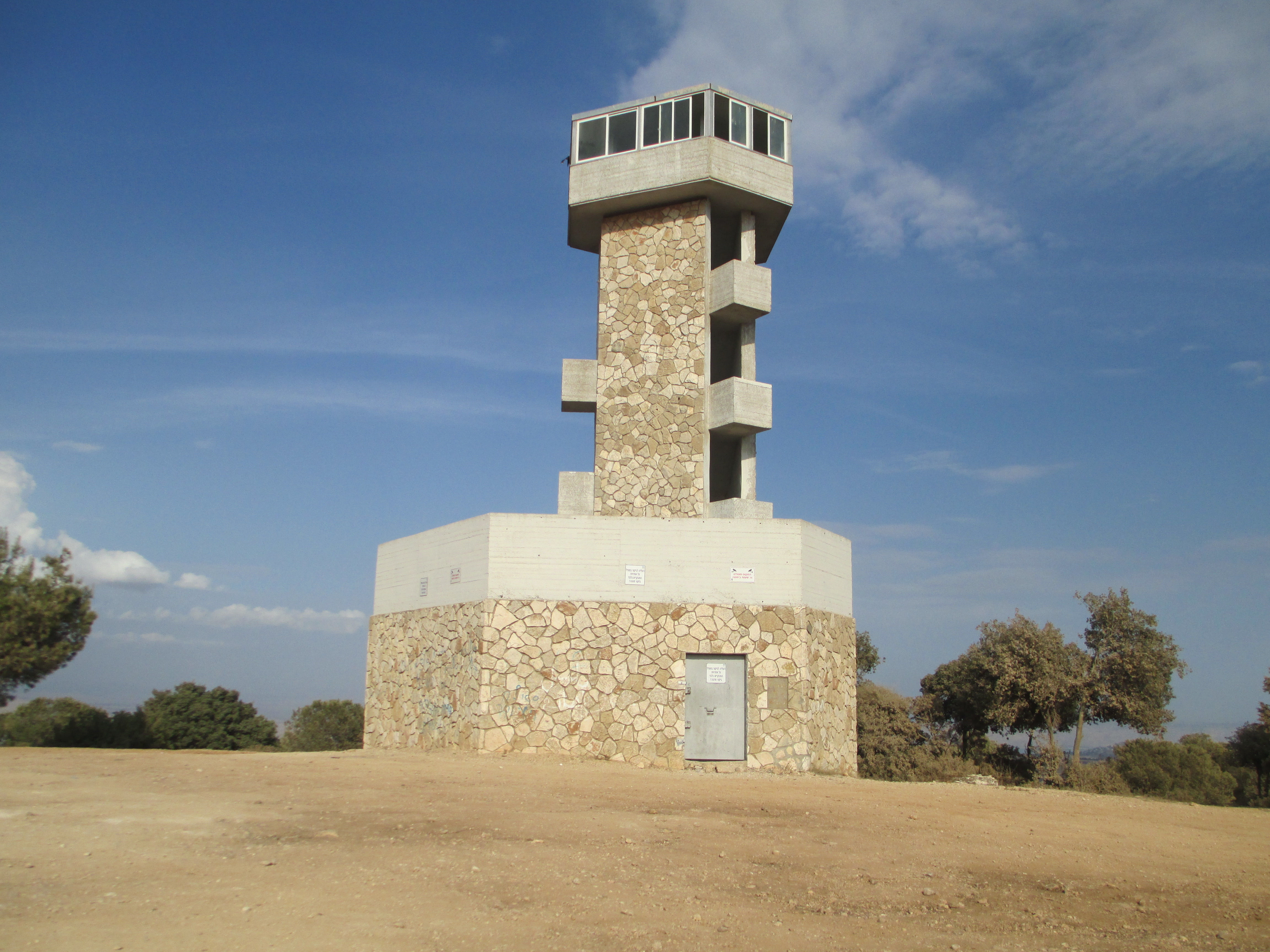 מגדל תורען